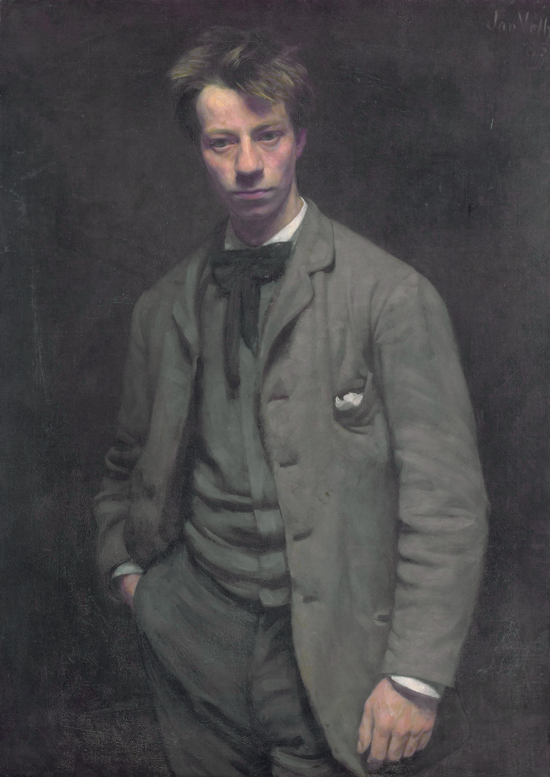 afbeelding uit 1885.